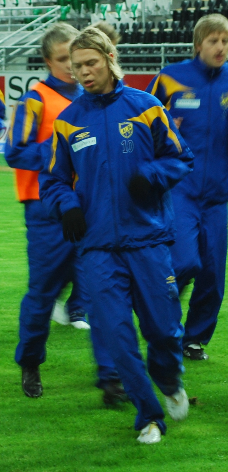 Magnus Andersen, fotballspiller hos Alta IF.